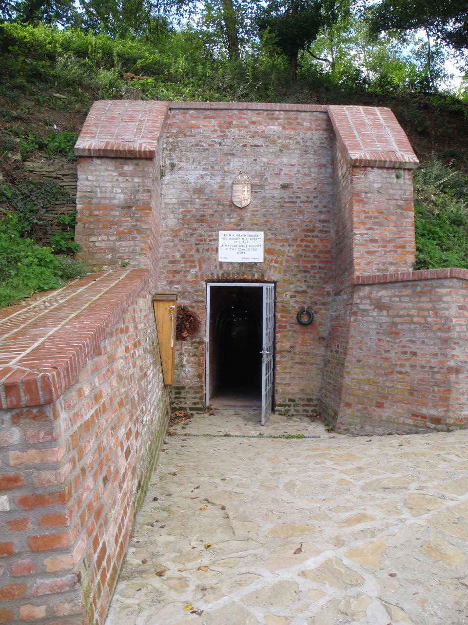 Koronabunker Kőszegen Kálvária utca végén